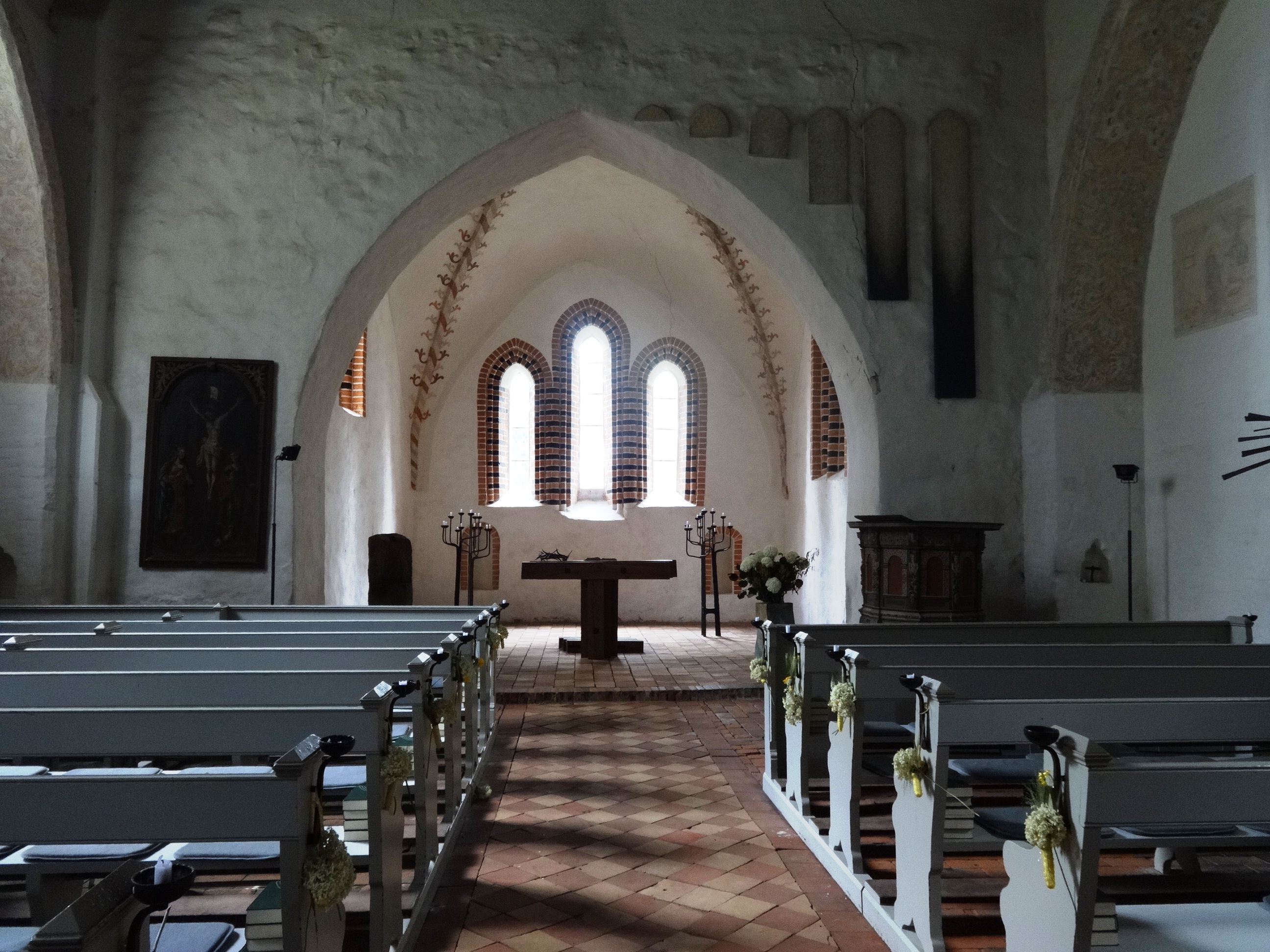 Die St.-Laurentius-Kirche Groß Kiesow ist ein aus dem 13. Jahrhundert stammendes Kirchengebäude in der Gemeinde Groß Kiesow. Zur Ausstattung gehört ein ehemaliges Altargemälde, eine Kopie der Kreuzigung nach Anton van Dyck, aus der Zeit um 1700. Auf dem Friedhof stehen mehrere Grabwangen aus dem 18. und 19. Jahrhundert